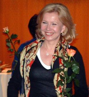 Małgorzata Zajączkowska, Polish writer